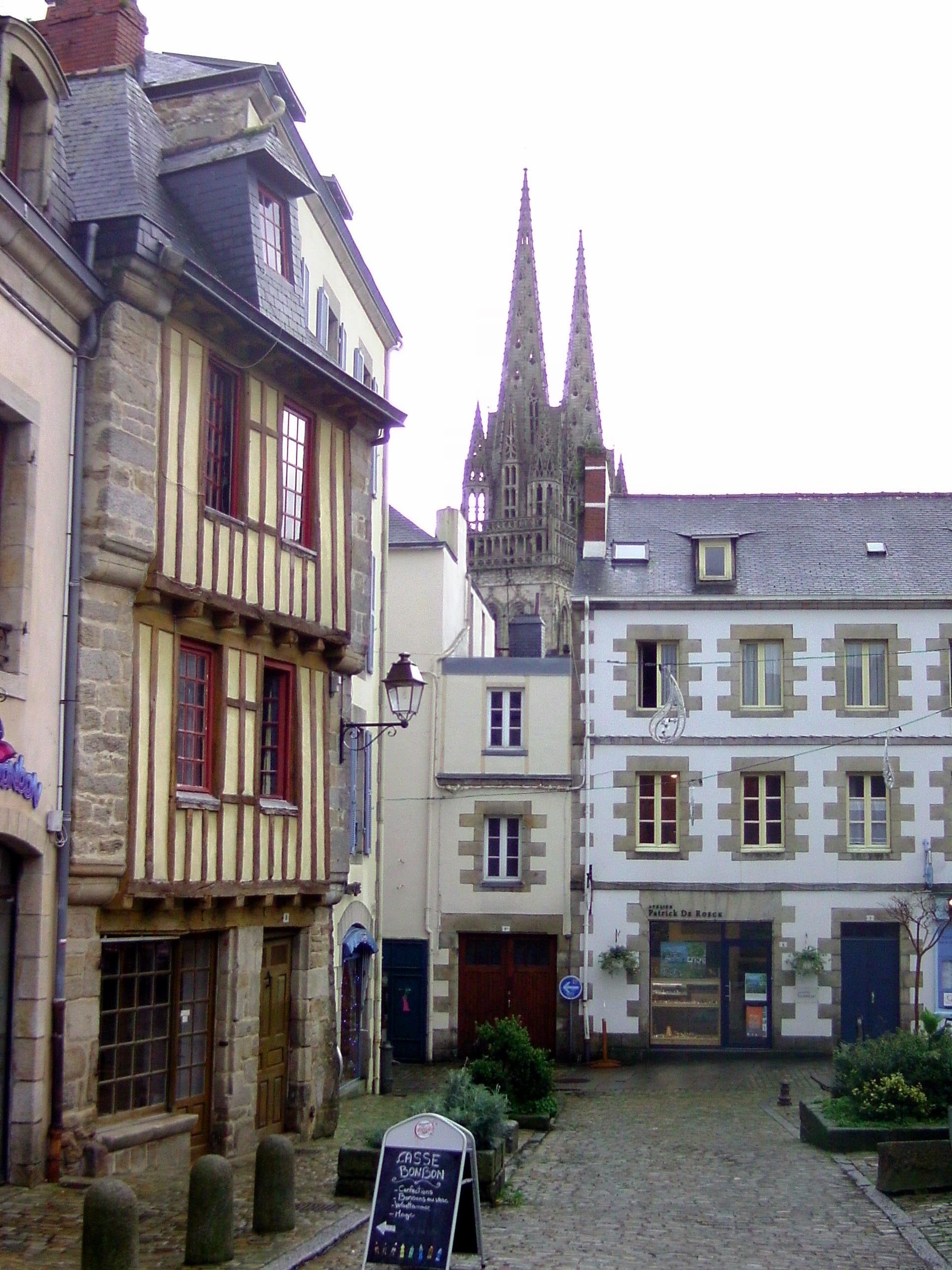 Altstadt von Quimper mit Kathedrale im Hintergrund